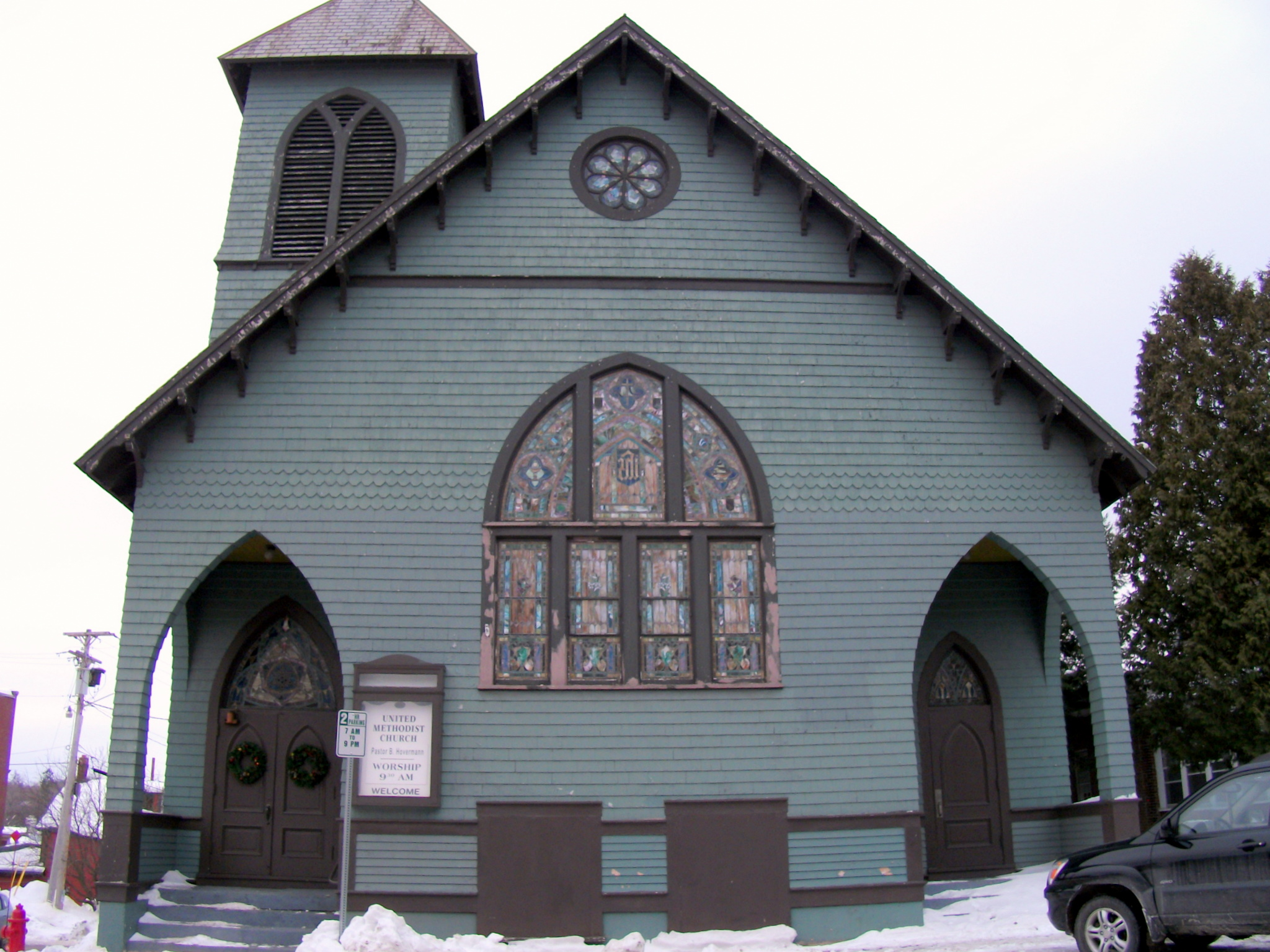 Winooski, Vermont